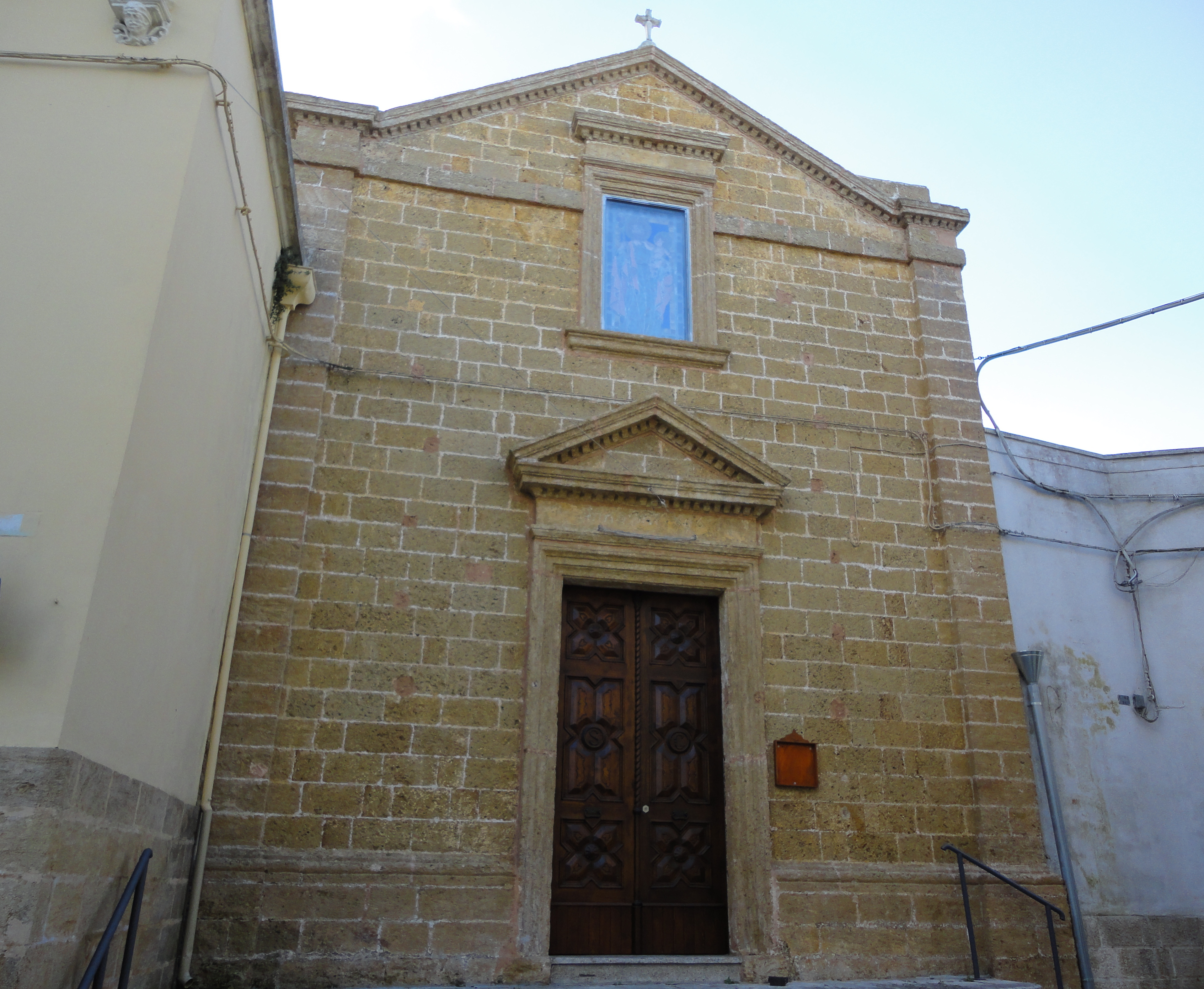 Chiesa San Giuseppe Patriarca Squinzano, Lecce